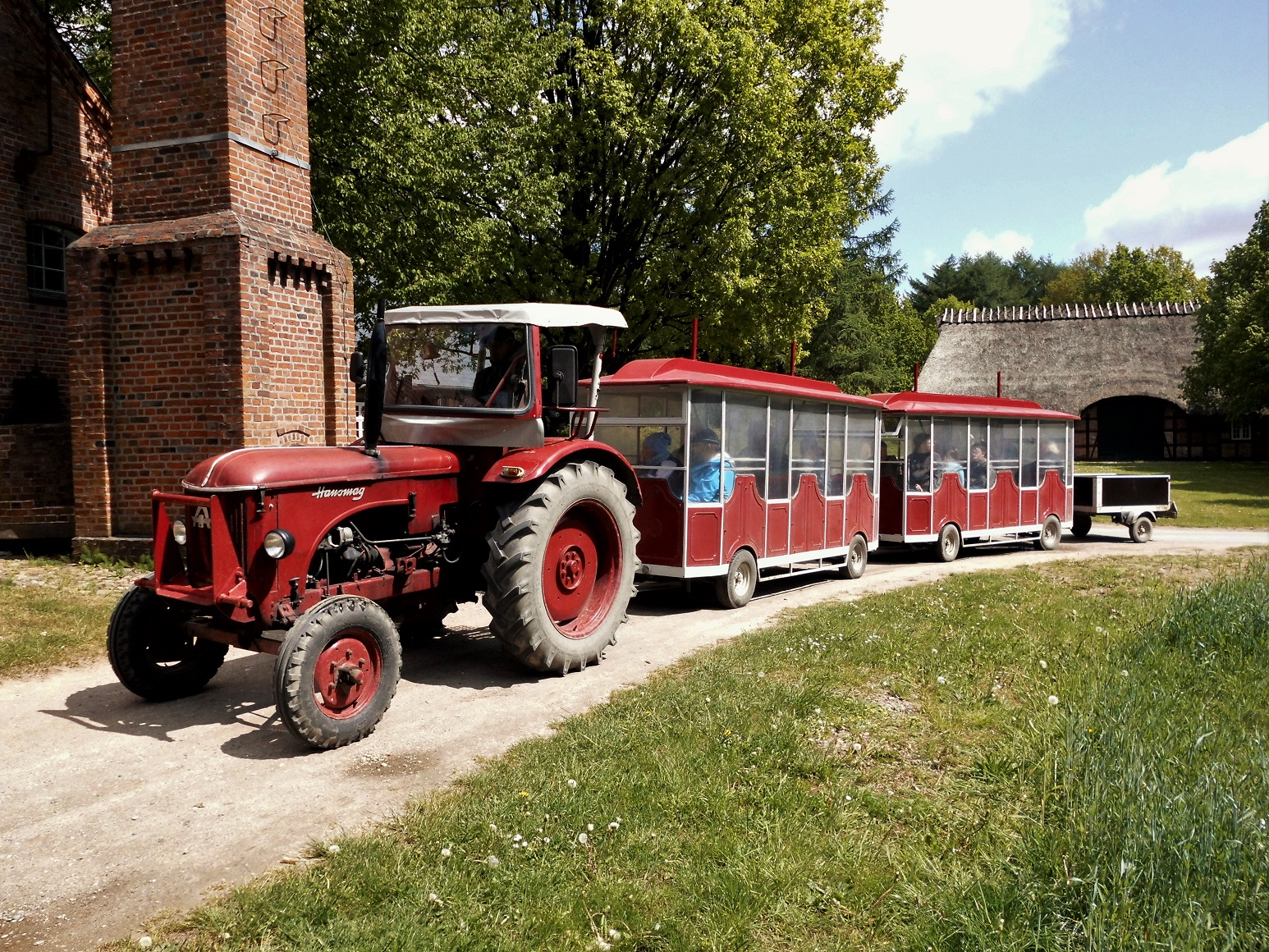 Der Rundfahrt-Traktor mit Personen-Anhängern im Freilichtmuseum Molfsee bei Kiel. In dem offenen Anhänger ganz hinten werden bei Bedarf Kinderwagen, Rollstühle und ähnliches transportiert.